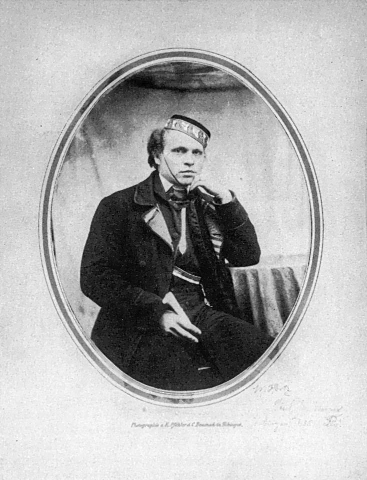 Porträt von Wilhelm (von) Hertz (Salzpapierabzug 180 × 143 mm)